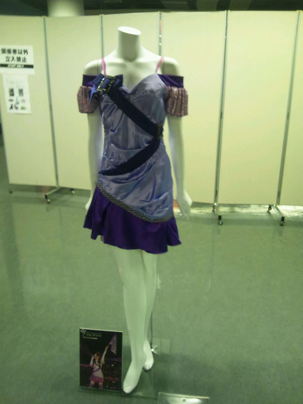 アニメロミックス Presents Minori Chihara Birthday Live 2012 supported by JOYSOUND 衣装展覧会より 『Minori Chihara Live Tour 2010 〜Sing All Love〜』の衣装。